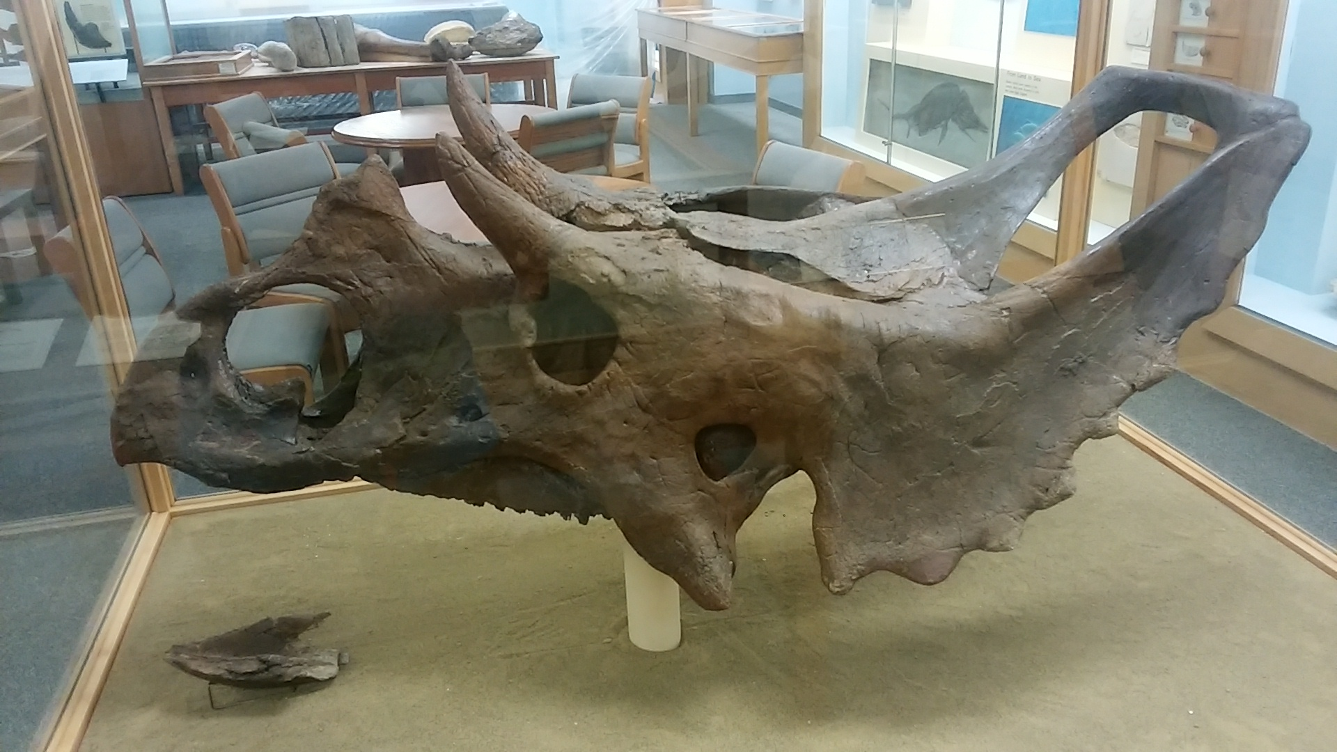 アルバータ大学収蔵